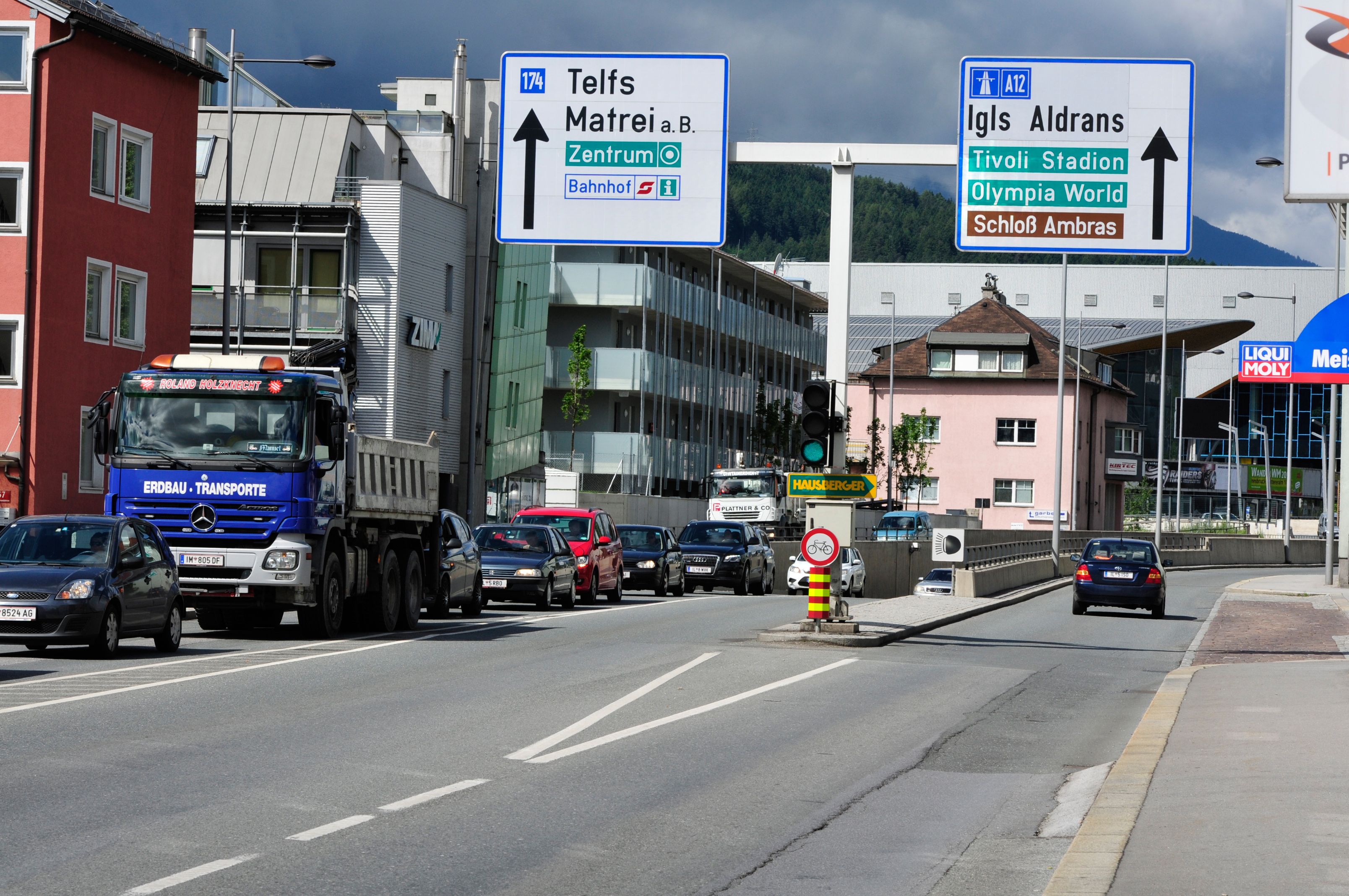 Innsbruck Südring Im Rahmen des Fußballländerspiels Österreich gegen Rumänien bin ich einige Stunden durch Innsbruck gefahren und habe Aufnahmen gemacht, die vielleicht mal gebraucht werden könnten. --Ralf Roleček 11:20, 10 June 2012 (UTC) The making of this work was supported by Wikimedia Austria. For other files made with the support of Wikimedia Austria, please see the category Supported by Wikimedia Österreich.